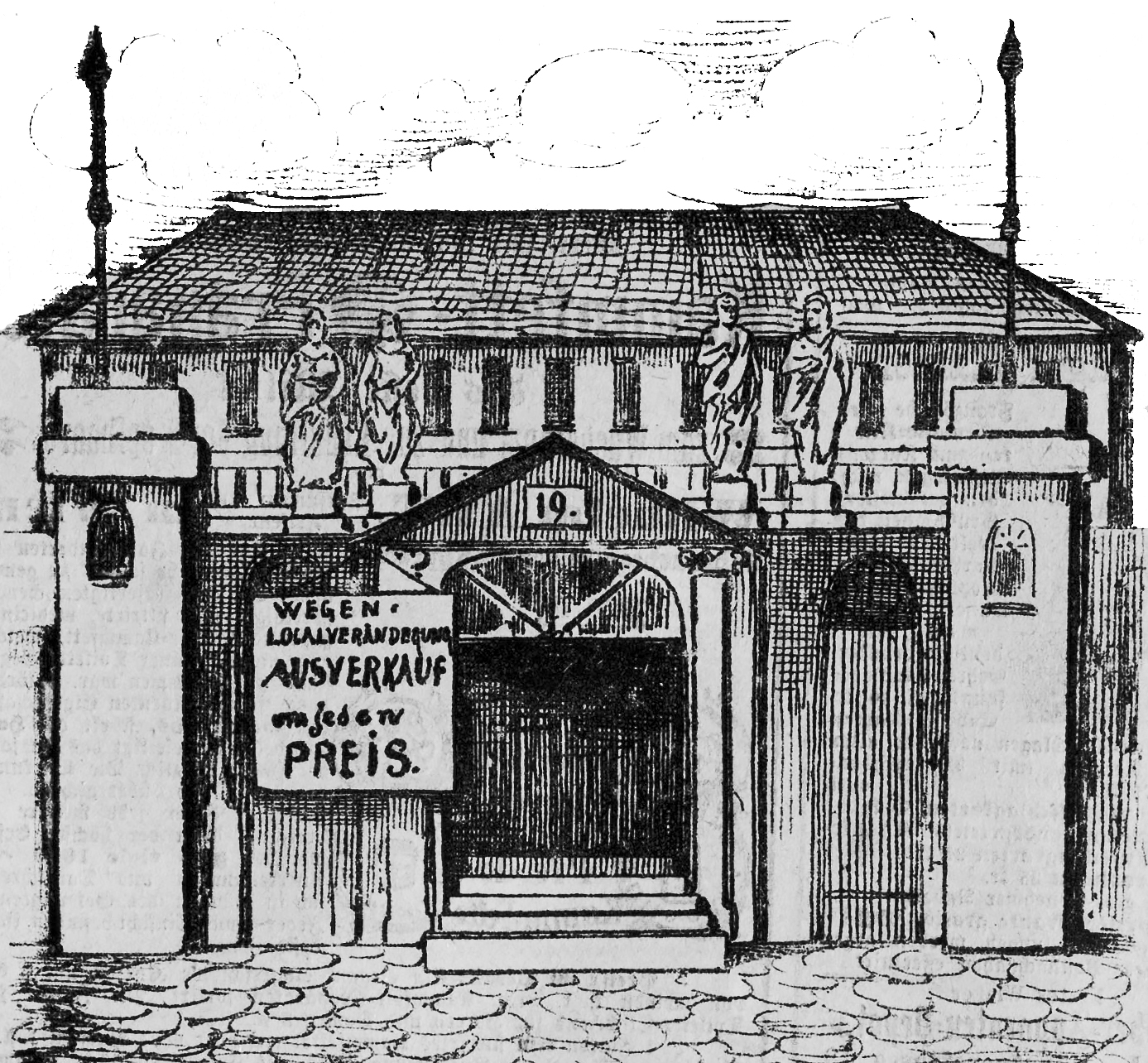 Wien-Innere Stadt, Schottenring 19, Provisorische Börse, erbaut 1871/72, Karikatur 1877